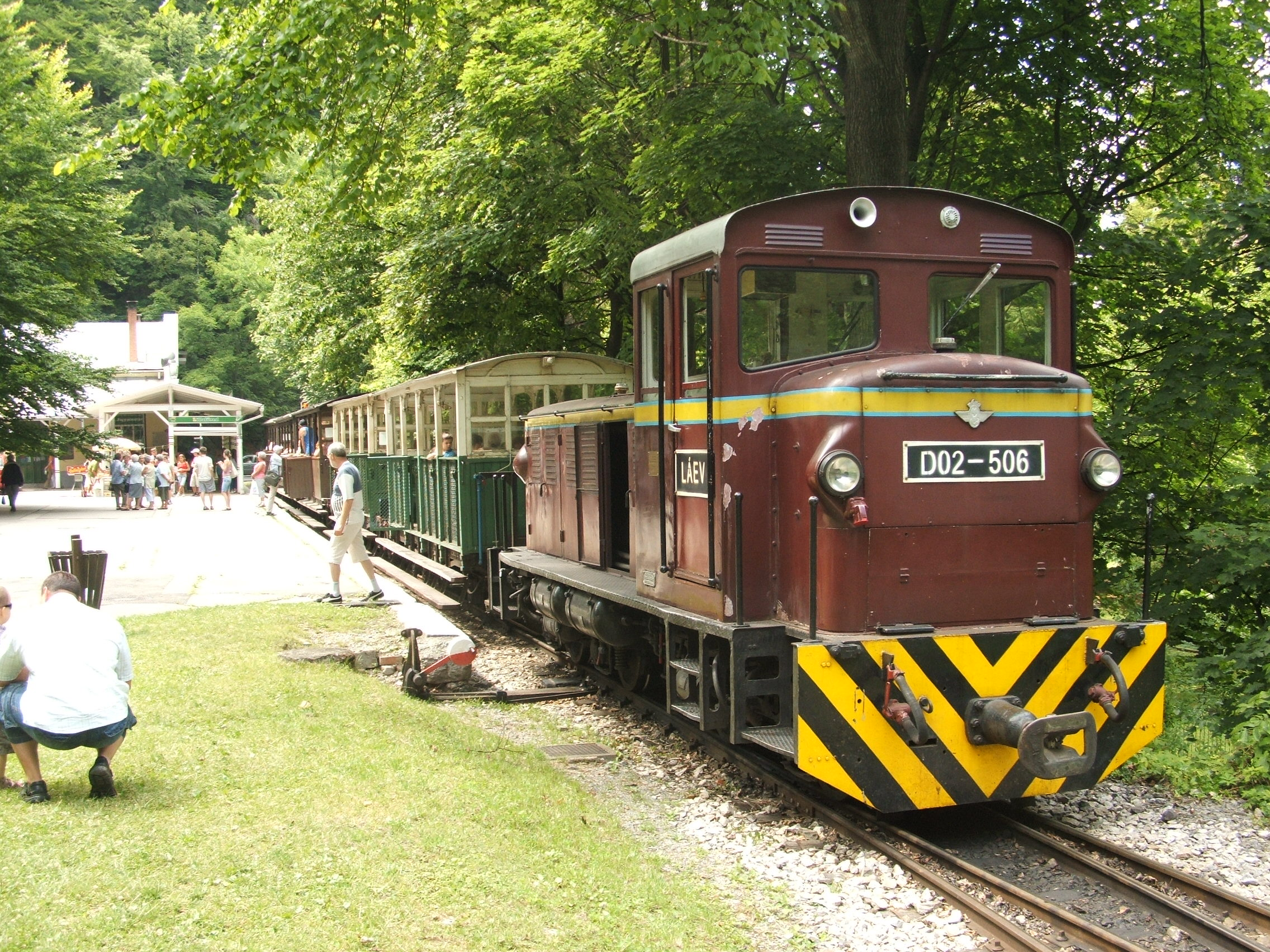 A LÁEV vonata Lillafüred állomáson